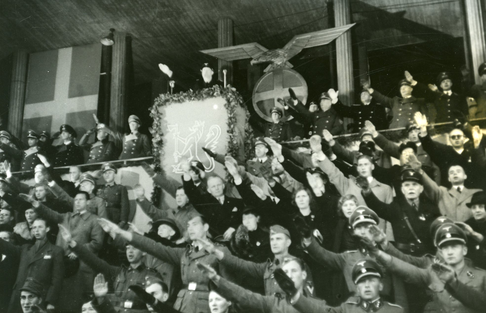 1942/09/27. RA/RAFA-3309/U 41B/12 / 41-12-11 img353